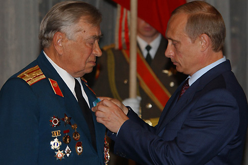 КУРСК. Вручение ордена Дружбы Герою Советского Союза, ветерану Великой Отечественной войны, участнику Курской битвы Михаилу Булатову.